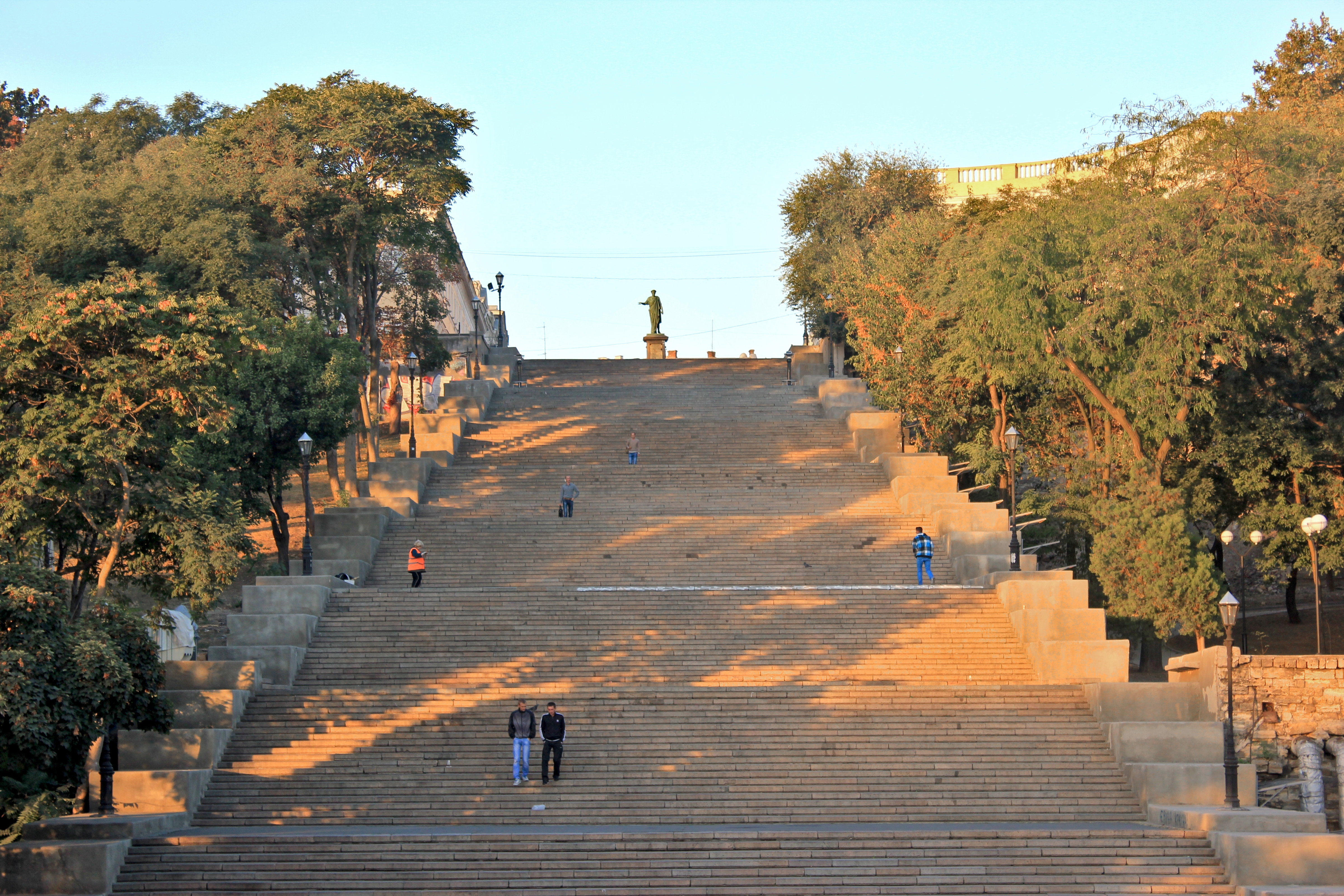 Die Potjemkinsche Treppe in Odessa.